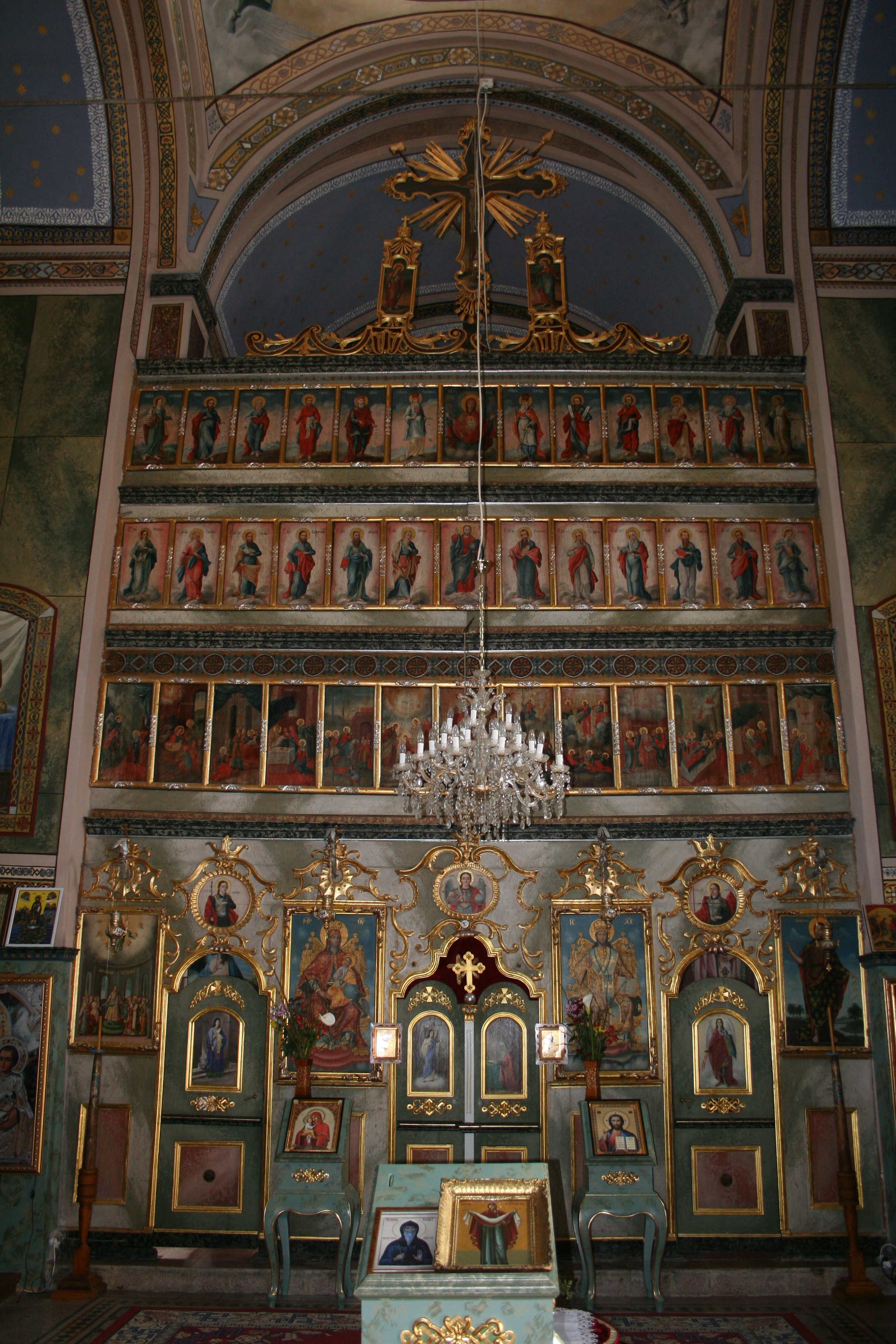 Manastir Mala Remeta